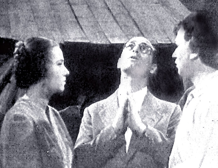 Il regista Mario Camerini con Dina Sassoli e Gino Cervi sul set de "I promessi sposi" (1941)